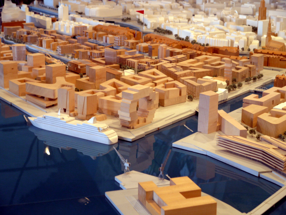 Modellphoto des geplanten Science Centers in Hamburg.